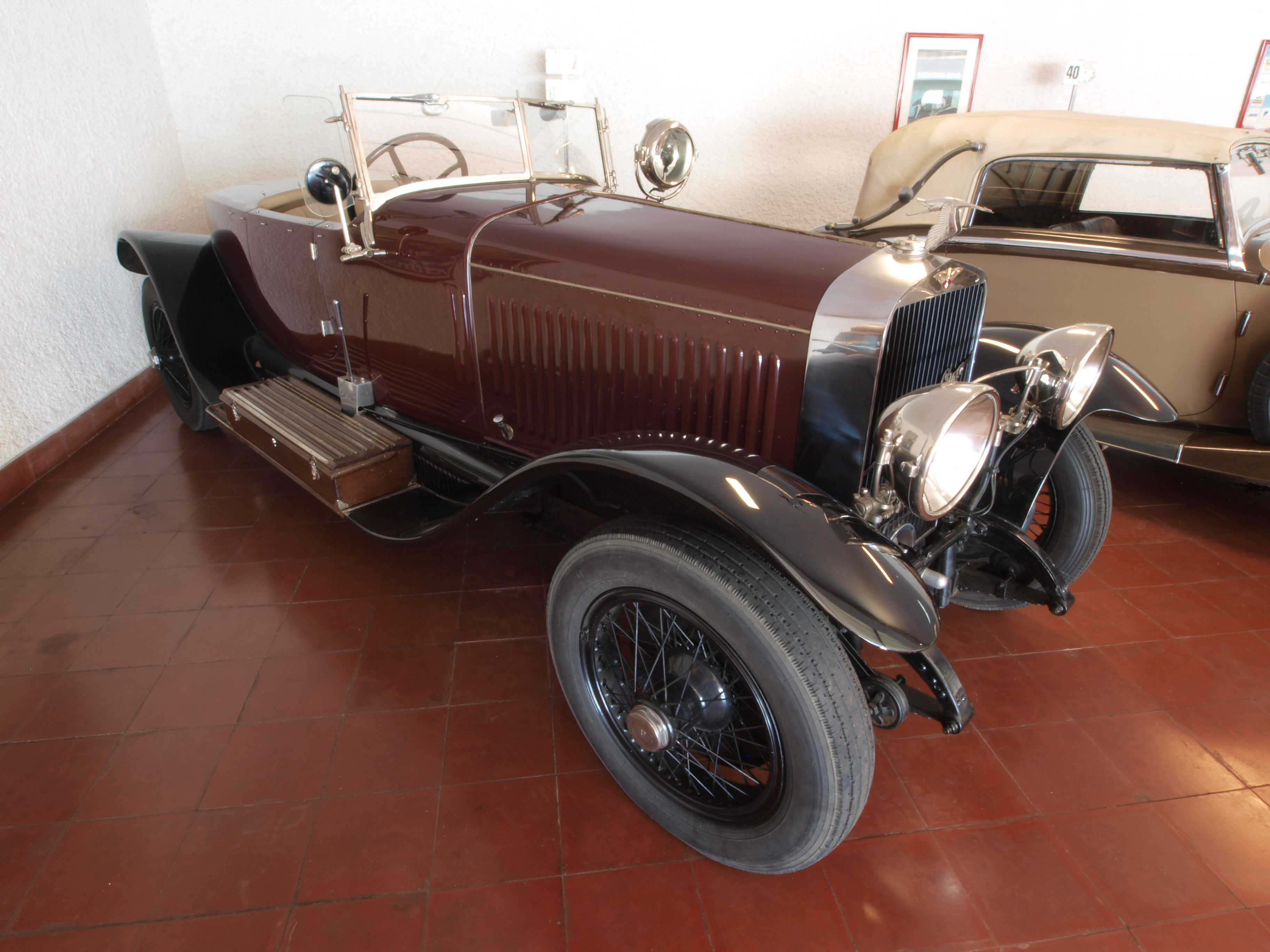 Photographed at the Caramulo museum, 'Museu do Caramulo', Caramulo, Portugal. OLYMPUS DIGITAL CAMERA